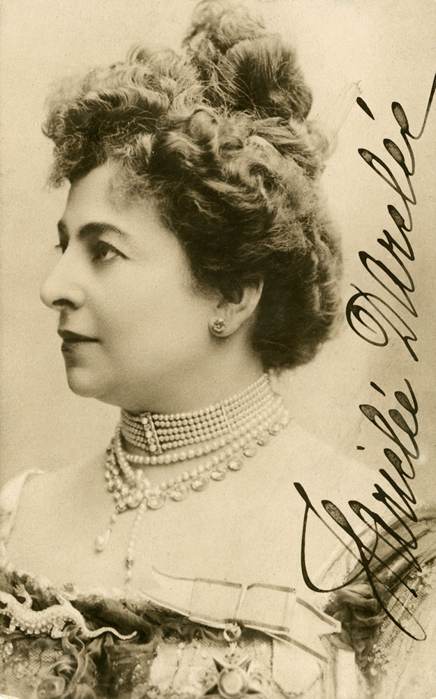 Hariclea Darclee, carte postala autografa, colectia Bibliotecii Acadmiei Romane, Cabinetul de Stampe.